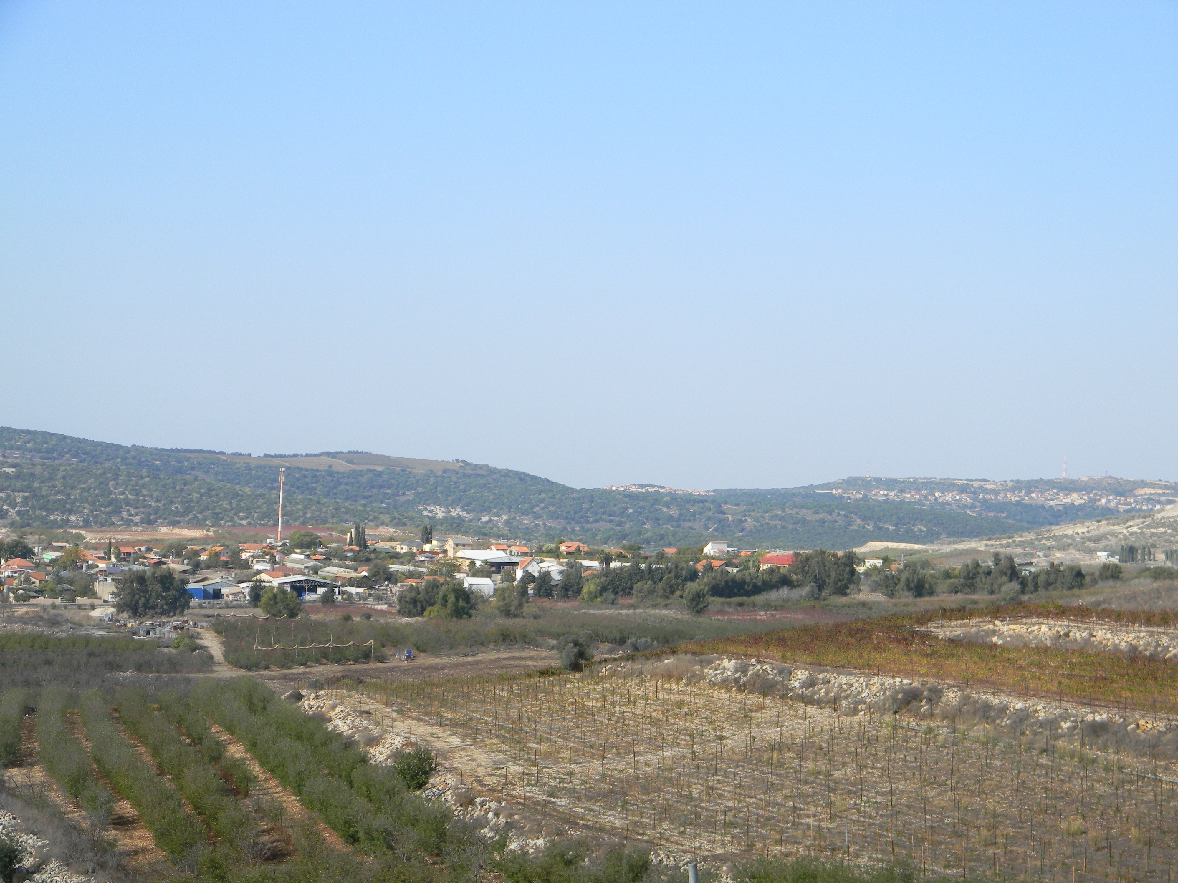 ספסופה